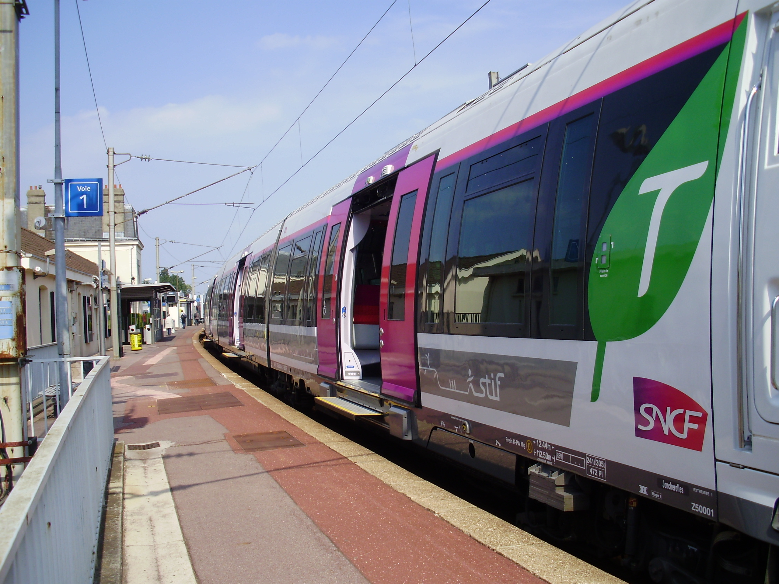 Gare de Montsoult - Maffliers, à Montsoult, Val-d'Oise, France : rame Z 50001 à l'arrêt, sur la voie 1, le long du bâtiment voyageurs